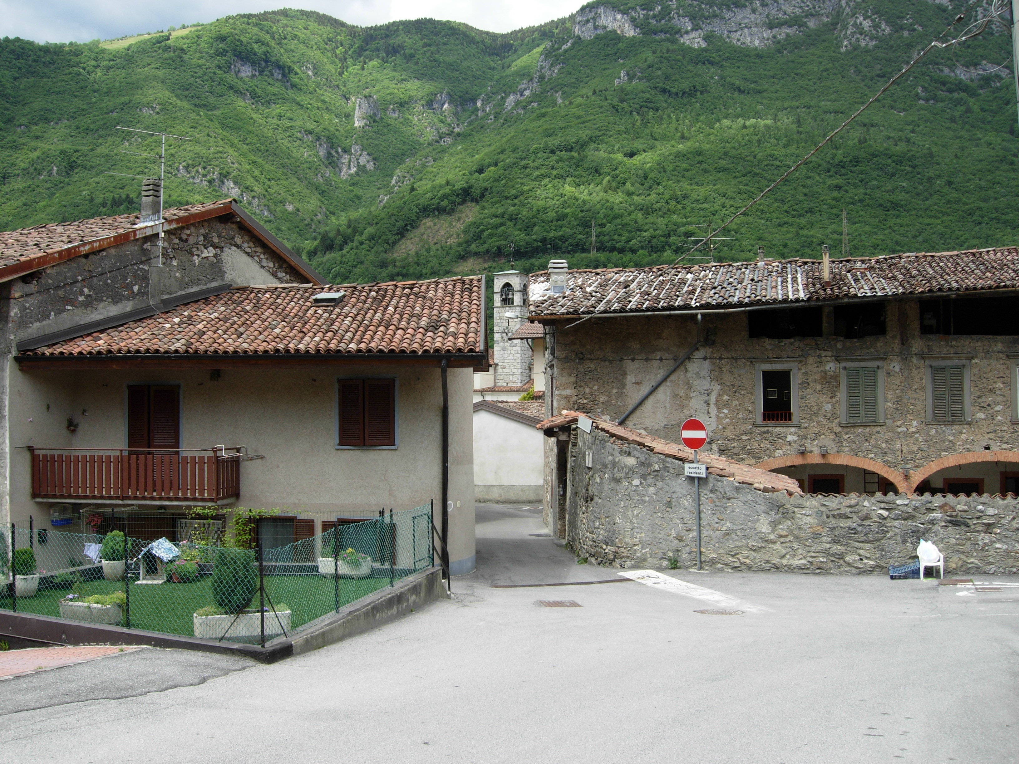 Contrada Cadoriano - Piario